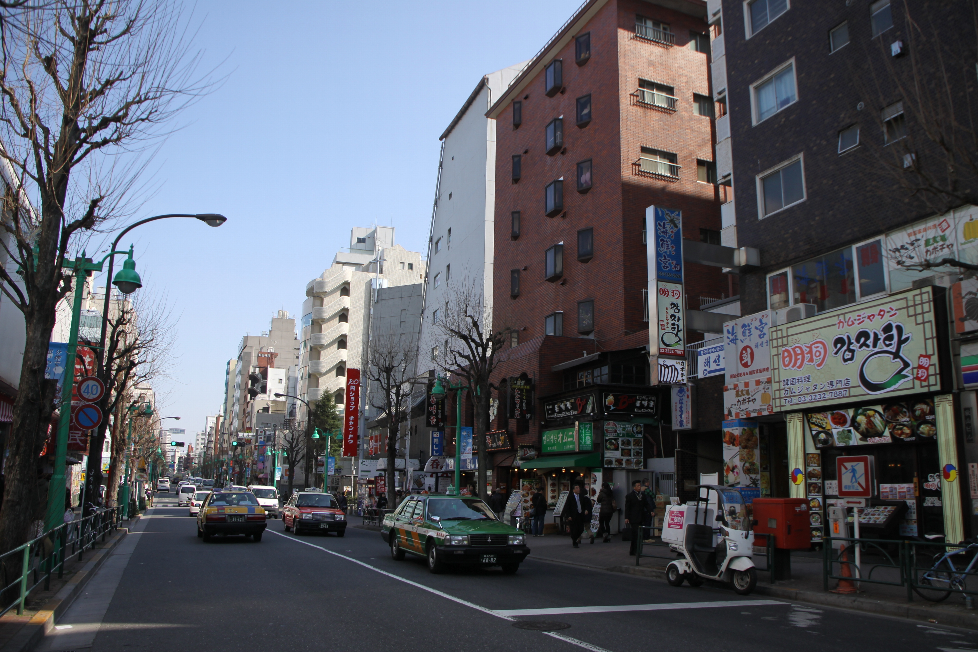 日本最大のコリア・タウンのひとつ大久保。ハングルが目立つ。